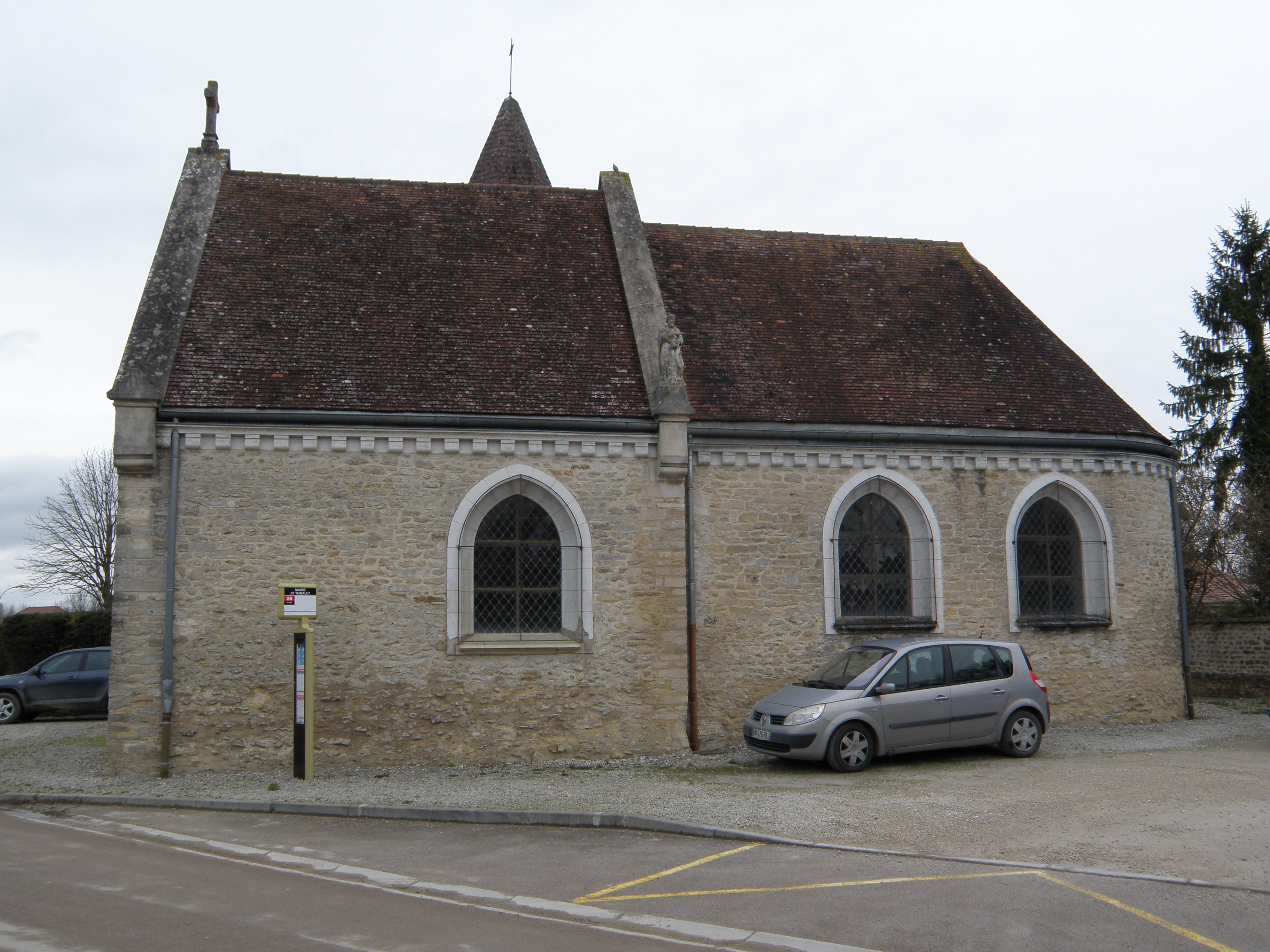 Église Saint-Thibault , 10800 Saint-Thibault.